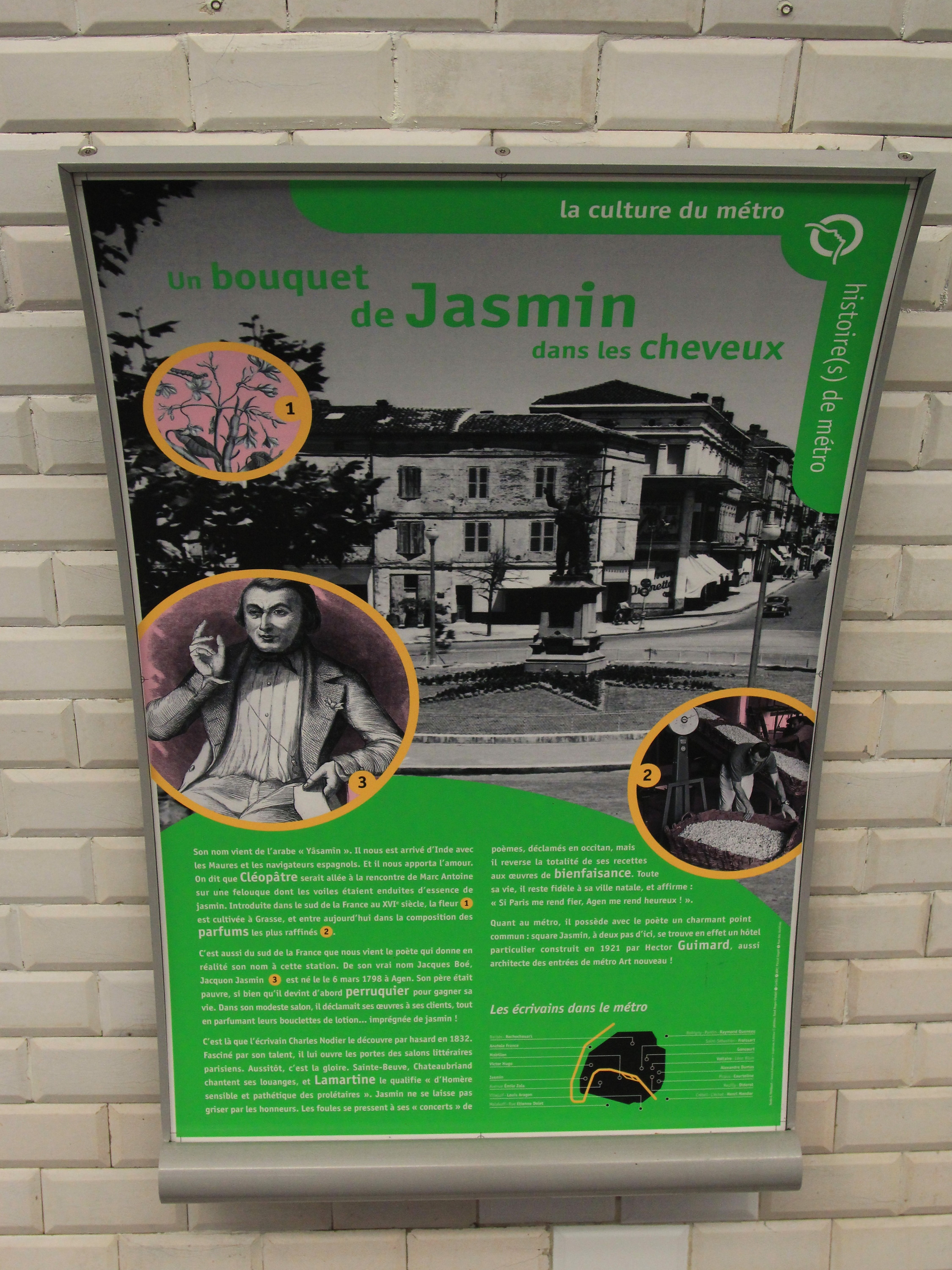 Plaque d'histoire relative au nom de la station Jasmin du métro parisien.